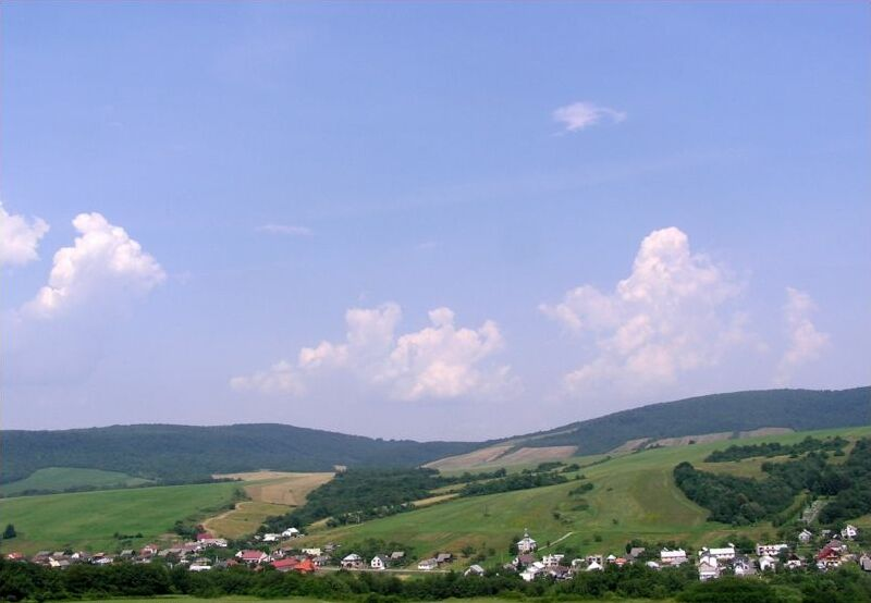 Celkový pohľad